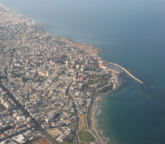 taken by : he:משתמש:אסף